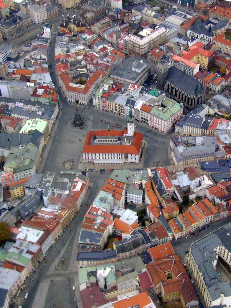 Olomouc, letecký pohled na centrum